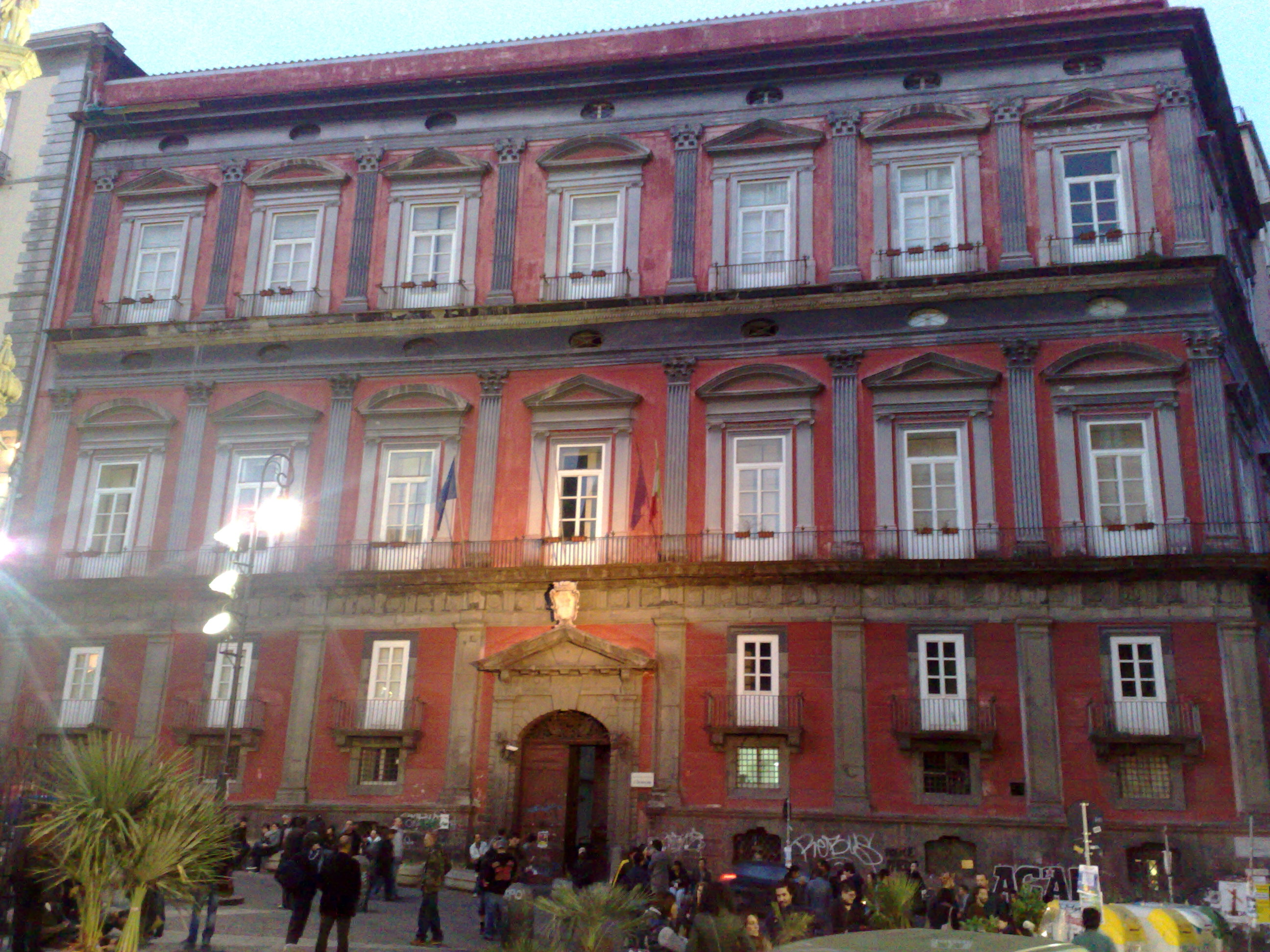 Palazzo Saluzzo di Corigliano (Napoli)